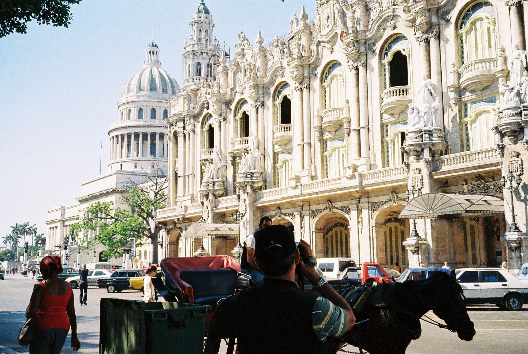 Capitol building in Havana, Cuba.